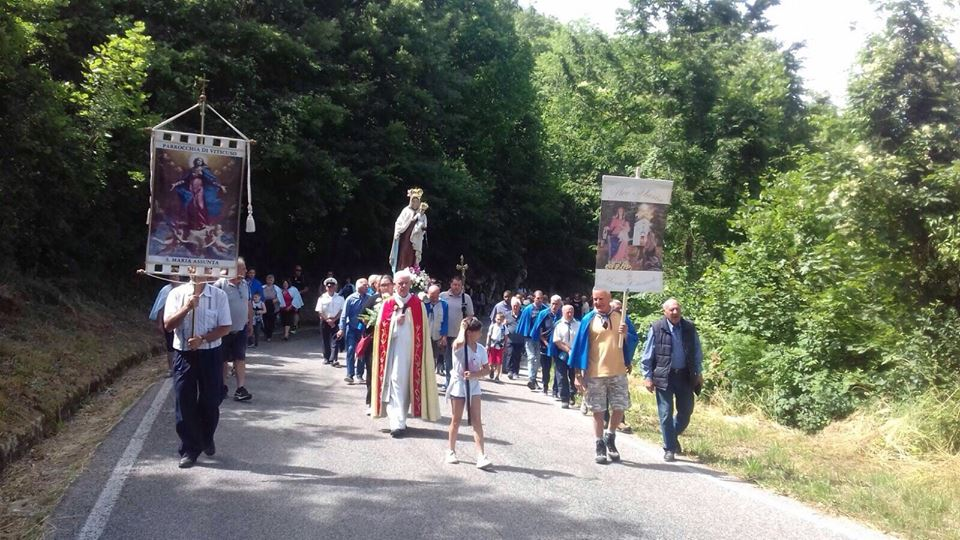 Acquafondata, pellegrinaggio alla Madonna del Carmine, prima domenica di luglio.